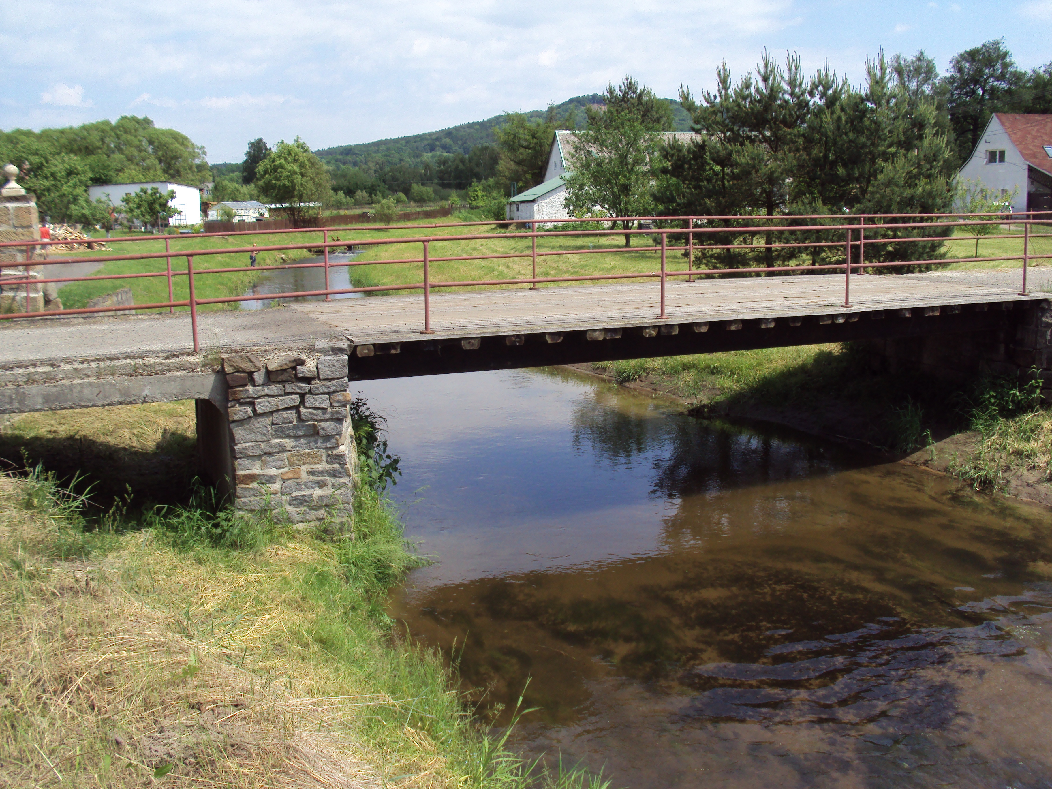 Česky: Můstek přes Svitávku v Zákupech - Božíkově